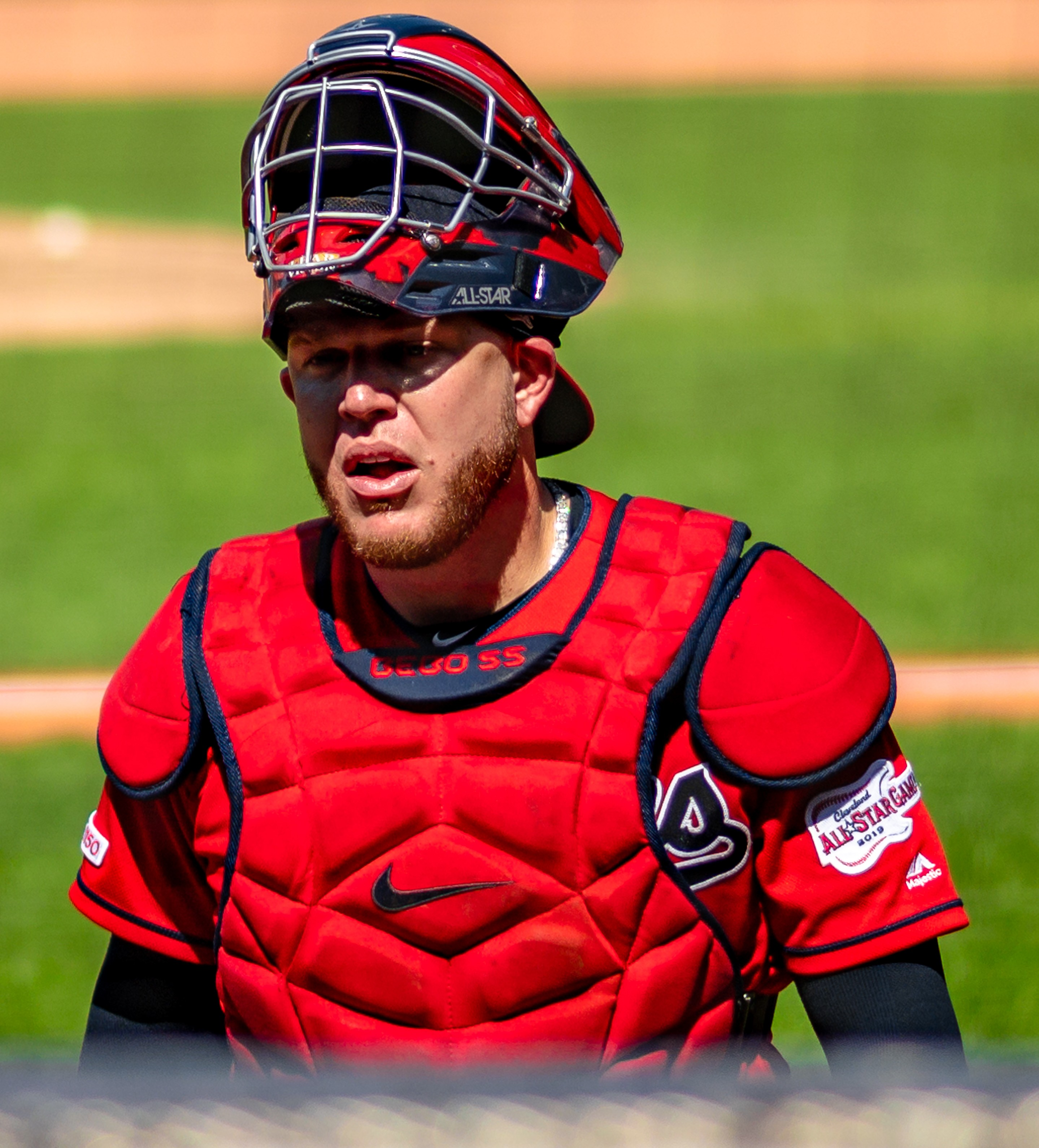 Los Angeles Angels VS. Cleveland Indians